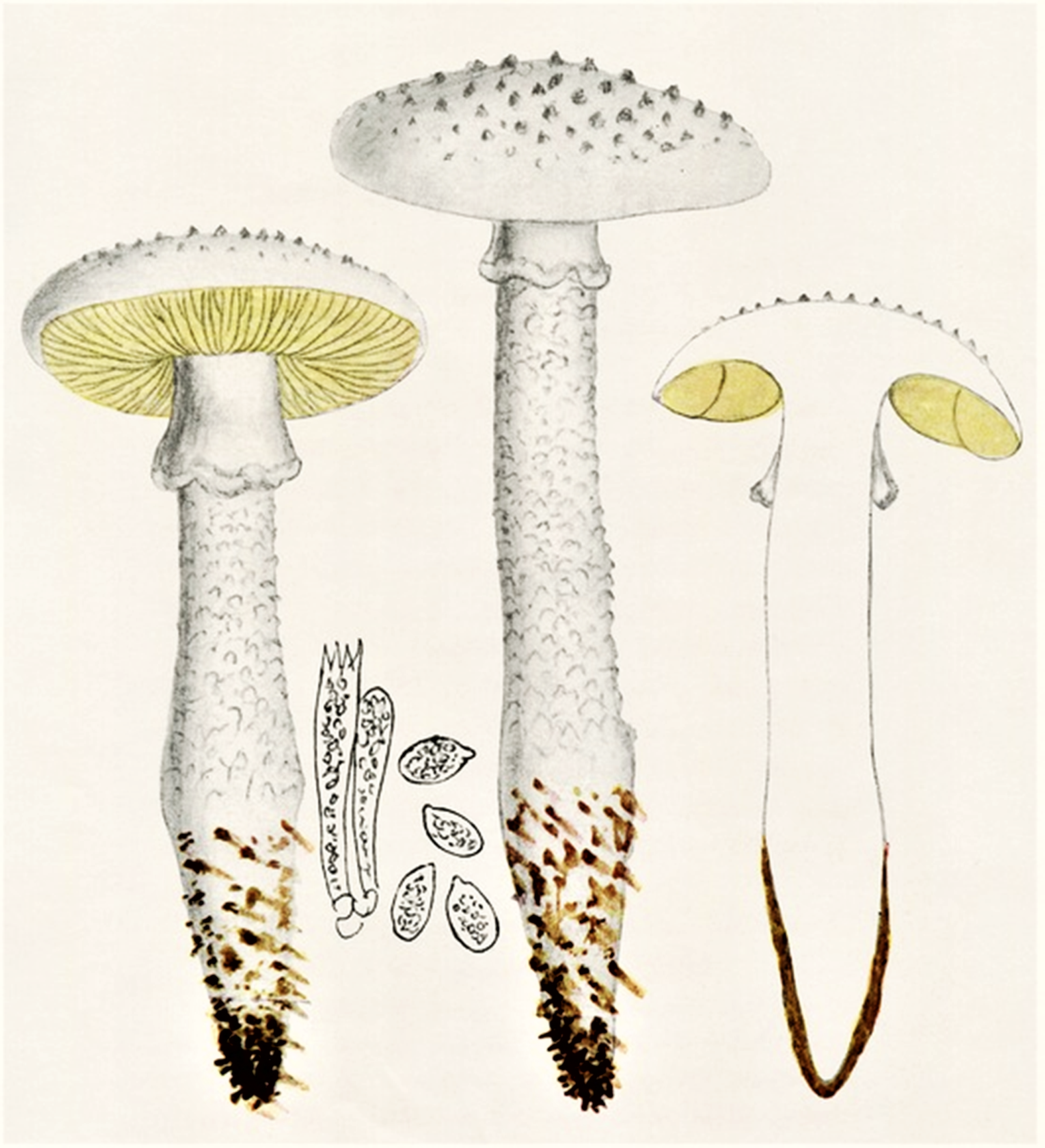 Giacomo Bresadola: Amanita echinocephala (Vittad., 1835) Quél. (1872)